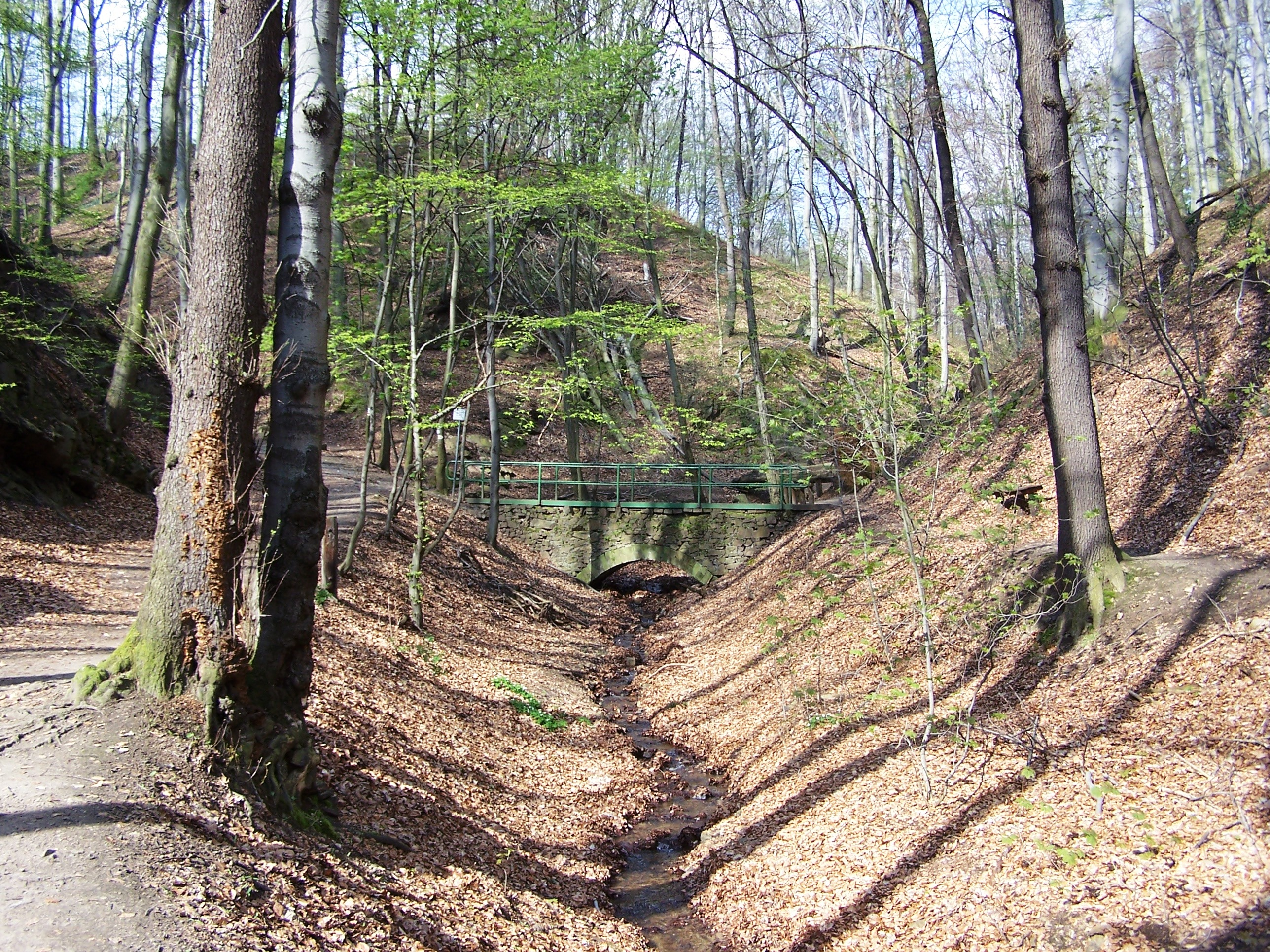 Fiedlergrund.